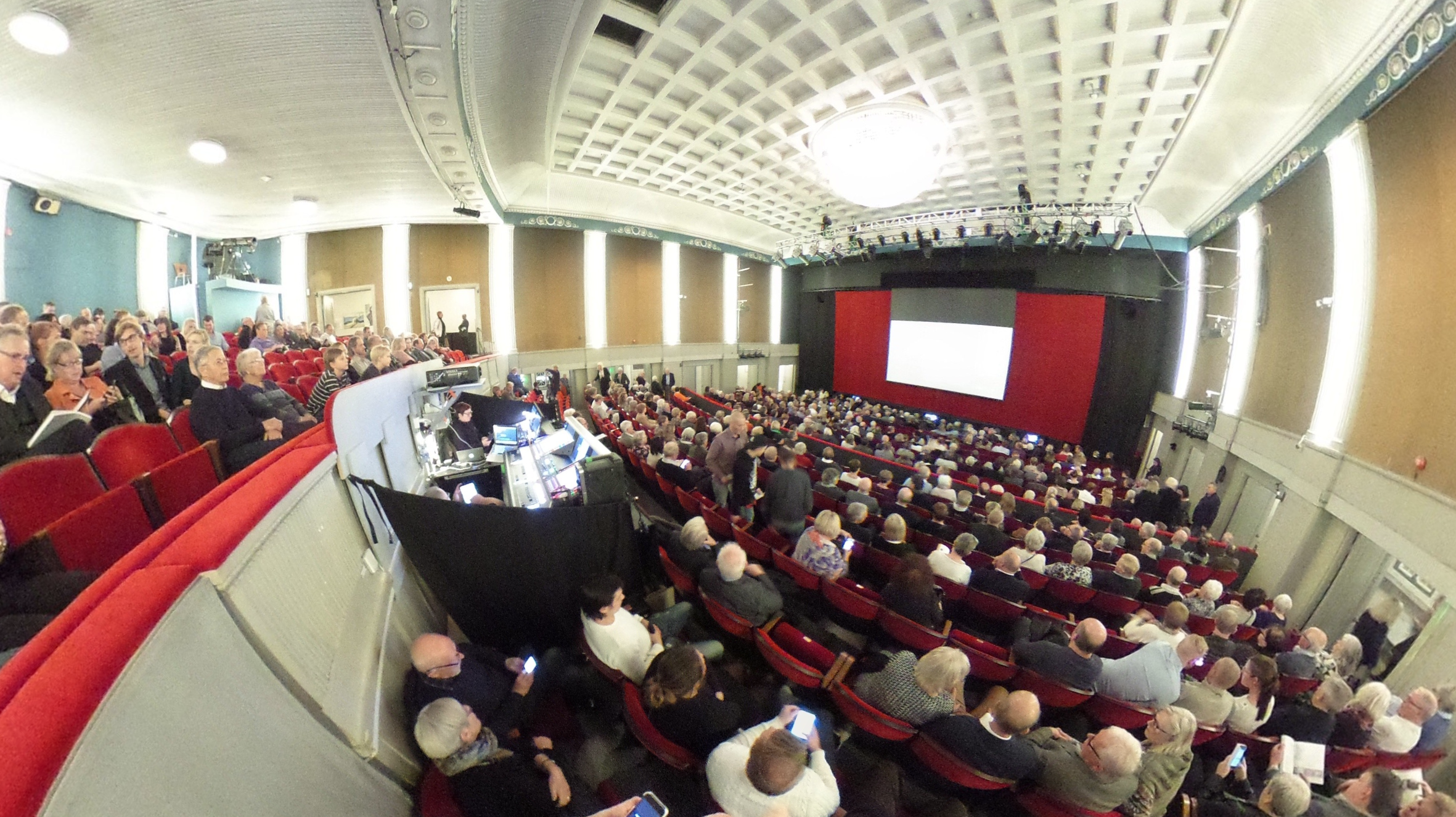 Lorensbergsteatern i november 2016, strax före en jubileumsföreställning av Macken